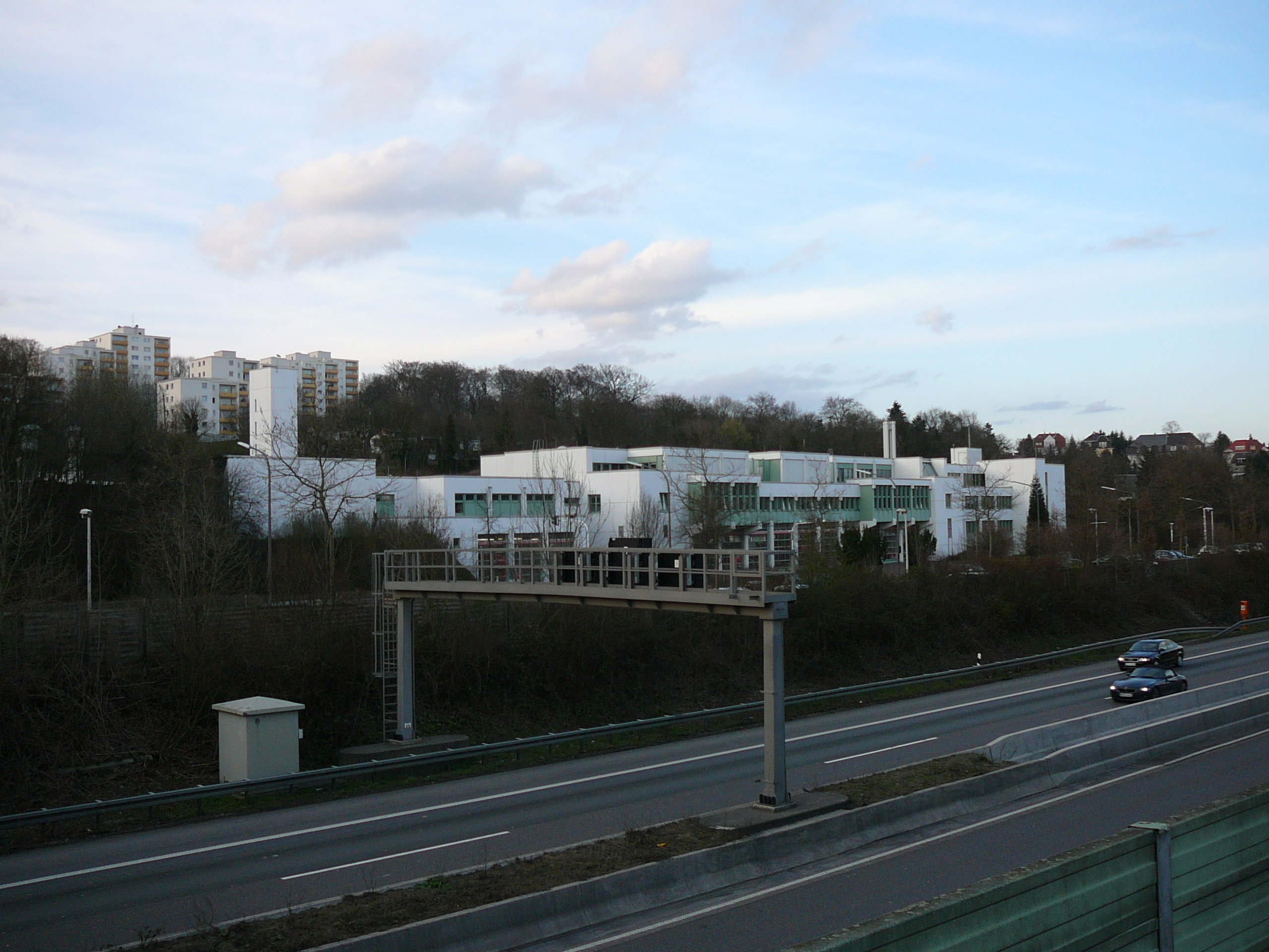 Feuerwache Wuppertal-Elberfeld